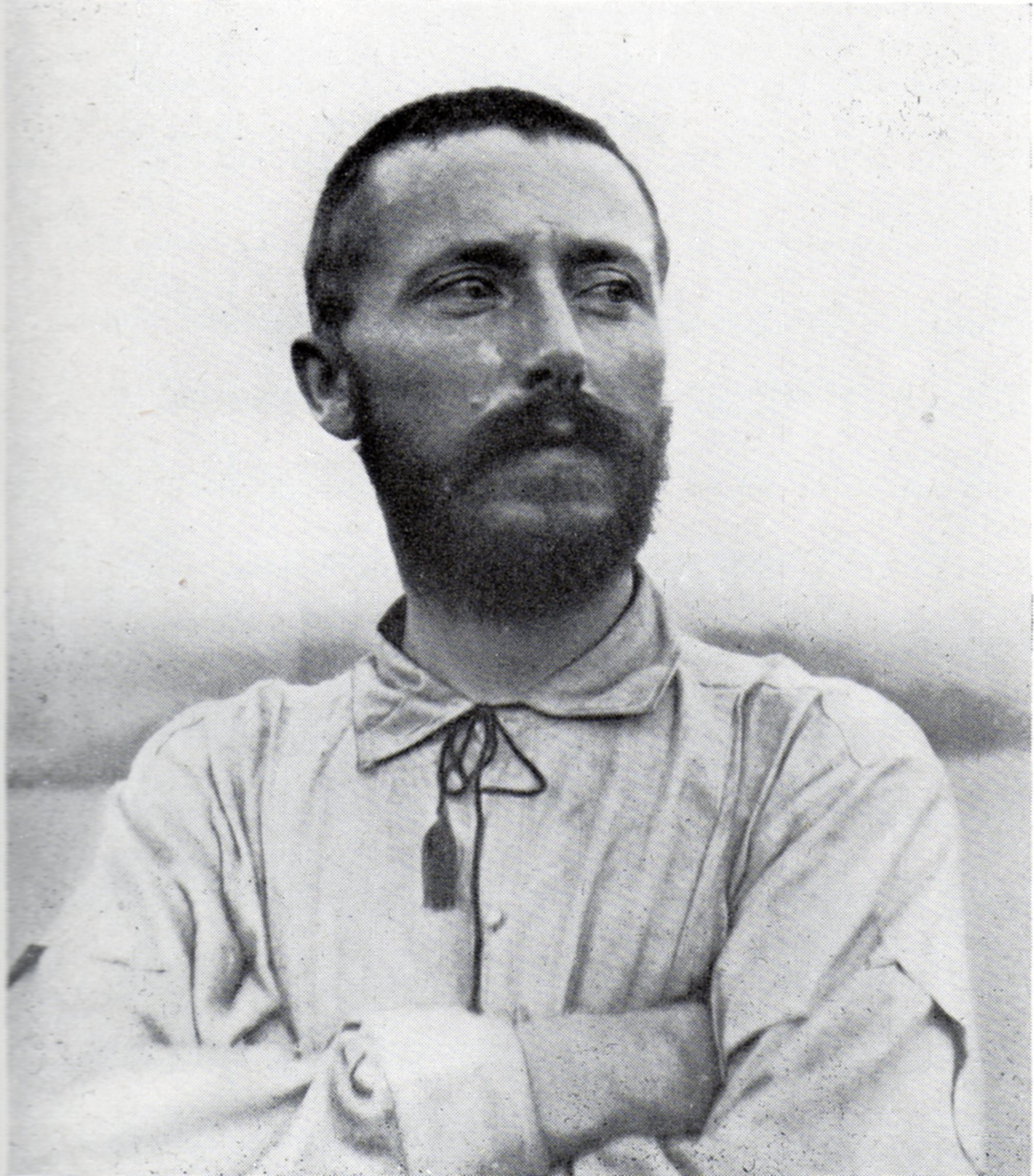 Monsieur Paul Le Marinel, 1858-1912. Officier de l'armée belge et explorateur du Congo.